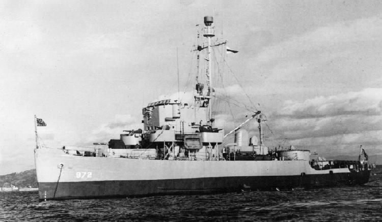 Patrol vessel USS Pce-872